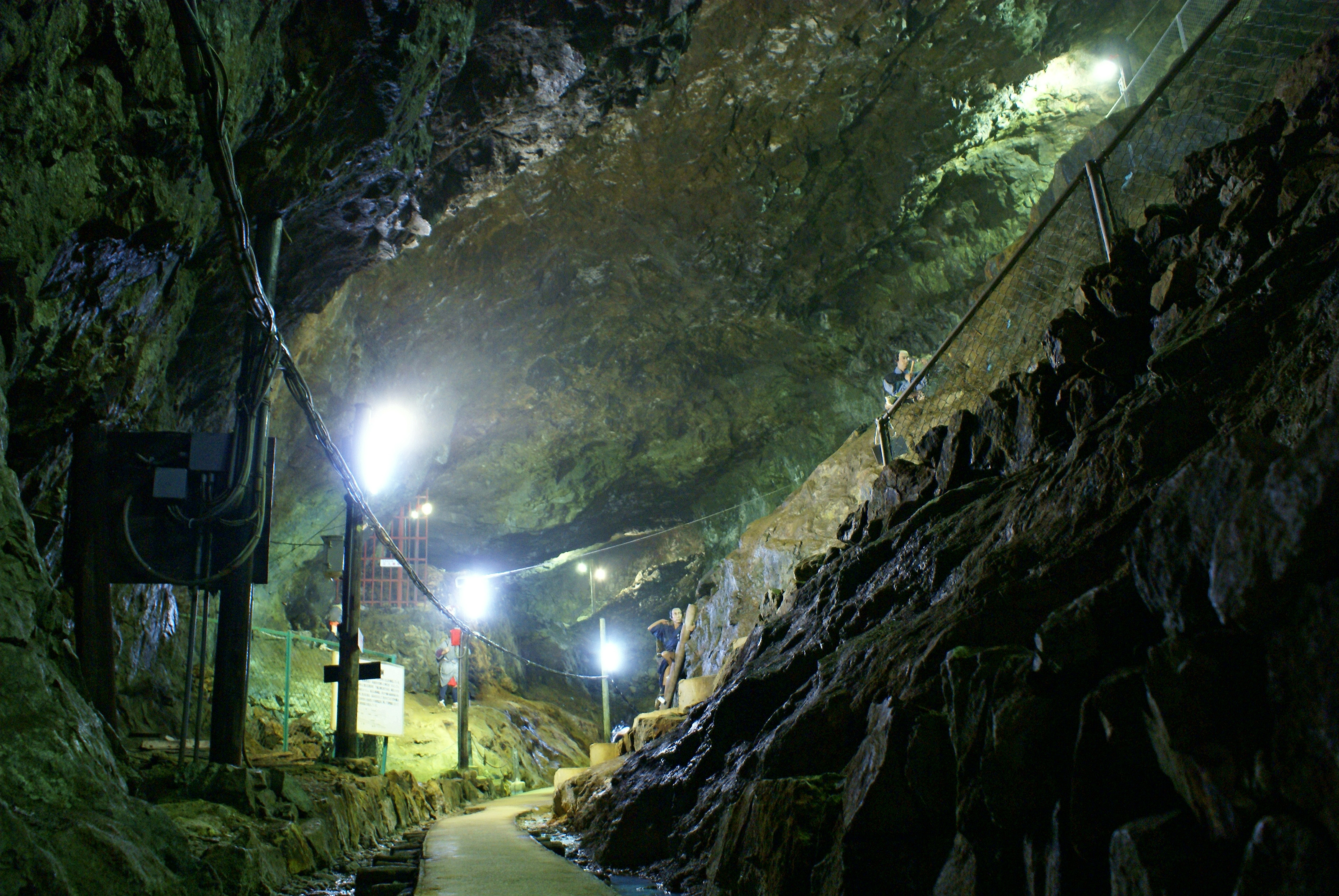 Sasaune gallery of Yoshioka copper mine, Takahashi, Okayama, Japan